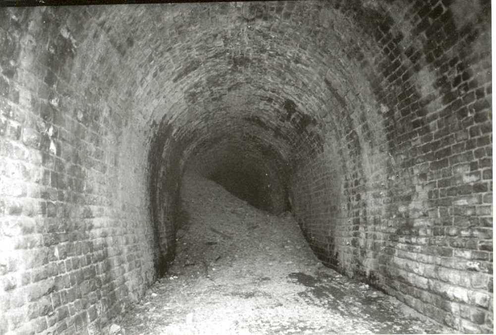 Ein durch eine Sprengung zerstörter Tunnel der Vennbahn, eigenes Bild, GNU FDL